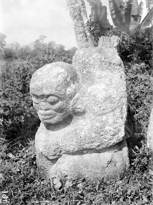 Negatief. Megalitisch beeld bij Tegoerwangi